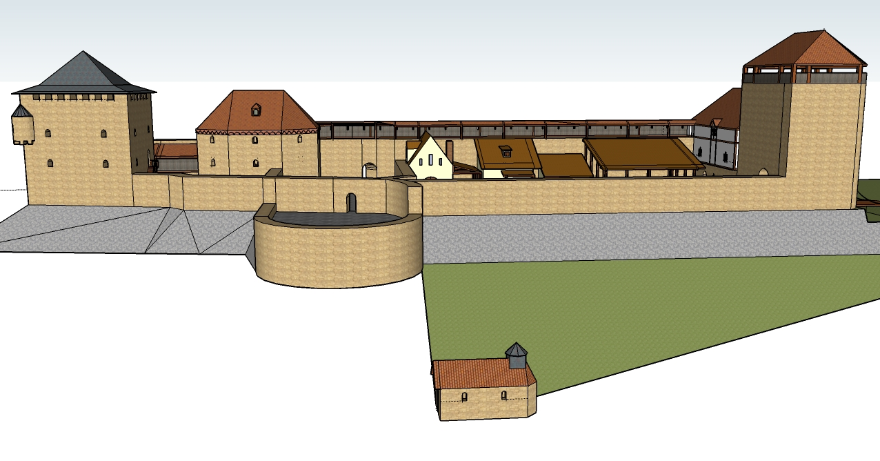 Sicht auf Hauenstein aus der Schweiz